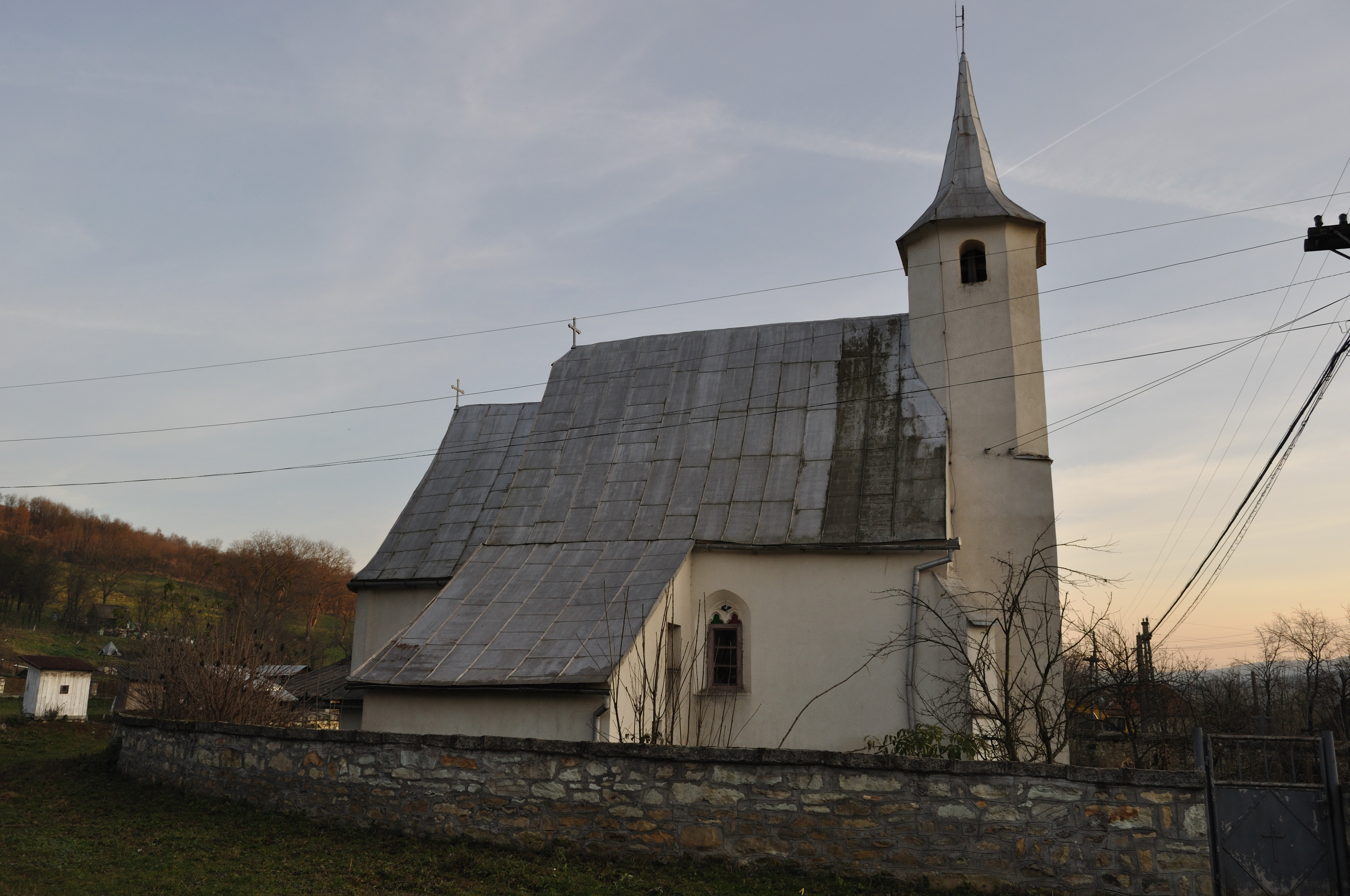 Cornești, județul Cluj